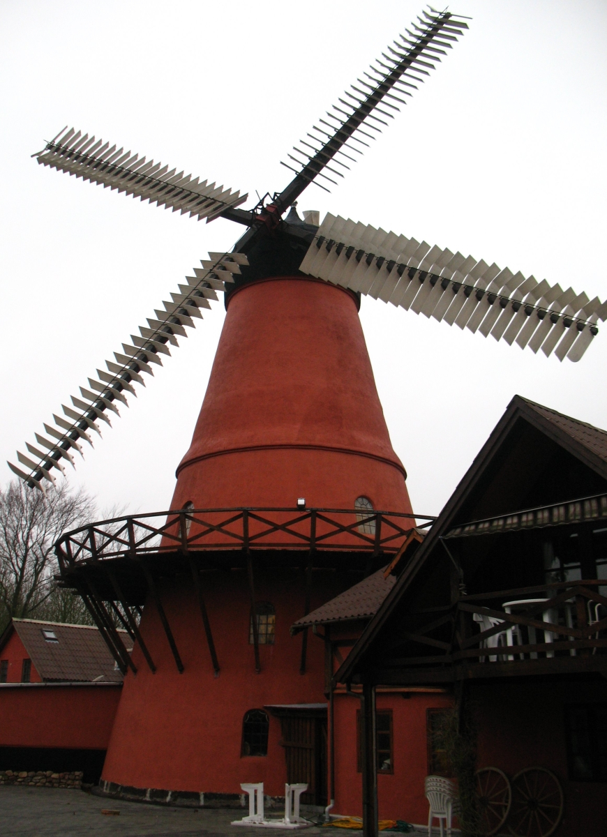 Åstrup Mølle, Svendborgvej 303, 5600 Faaborg Eget foto, Noorse Licentie: CC-BY-SA-3.0 Forminsket versjon for Wikipedia